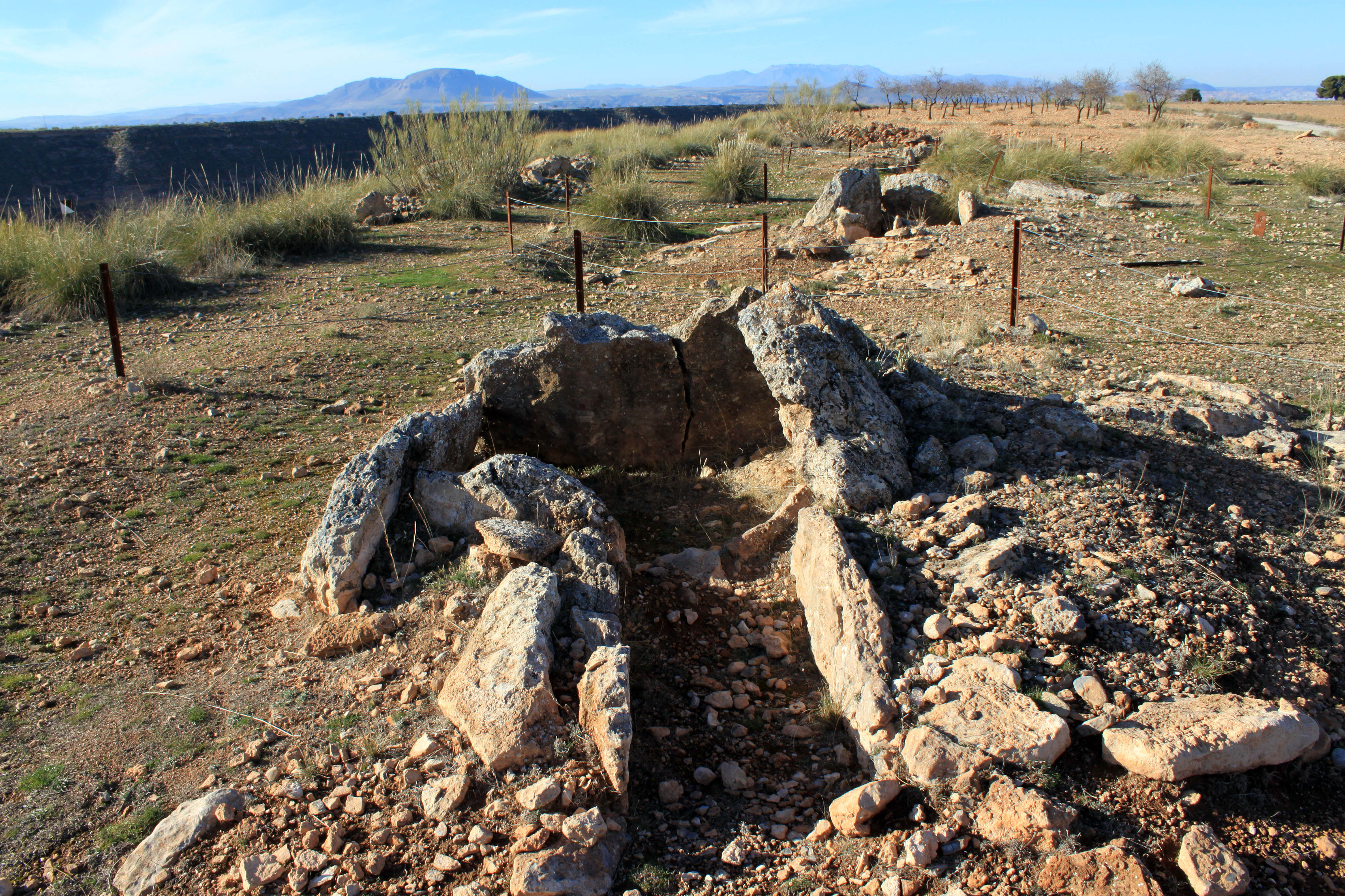 Dolmen 110 del Parque Megalítico de Gorafe situado en el Llano de Olivares. Gorafe, provincia de Granada, Andalucía, España.